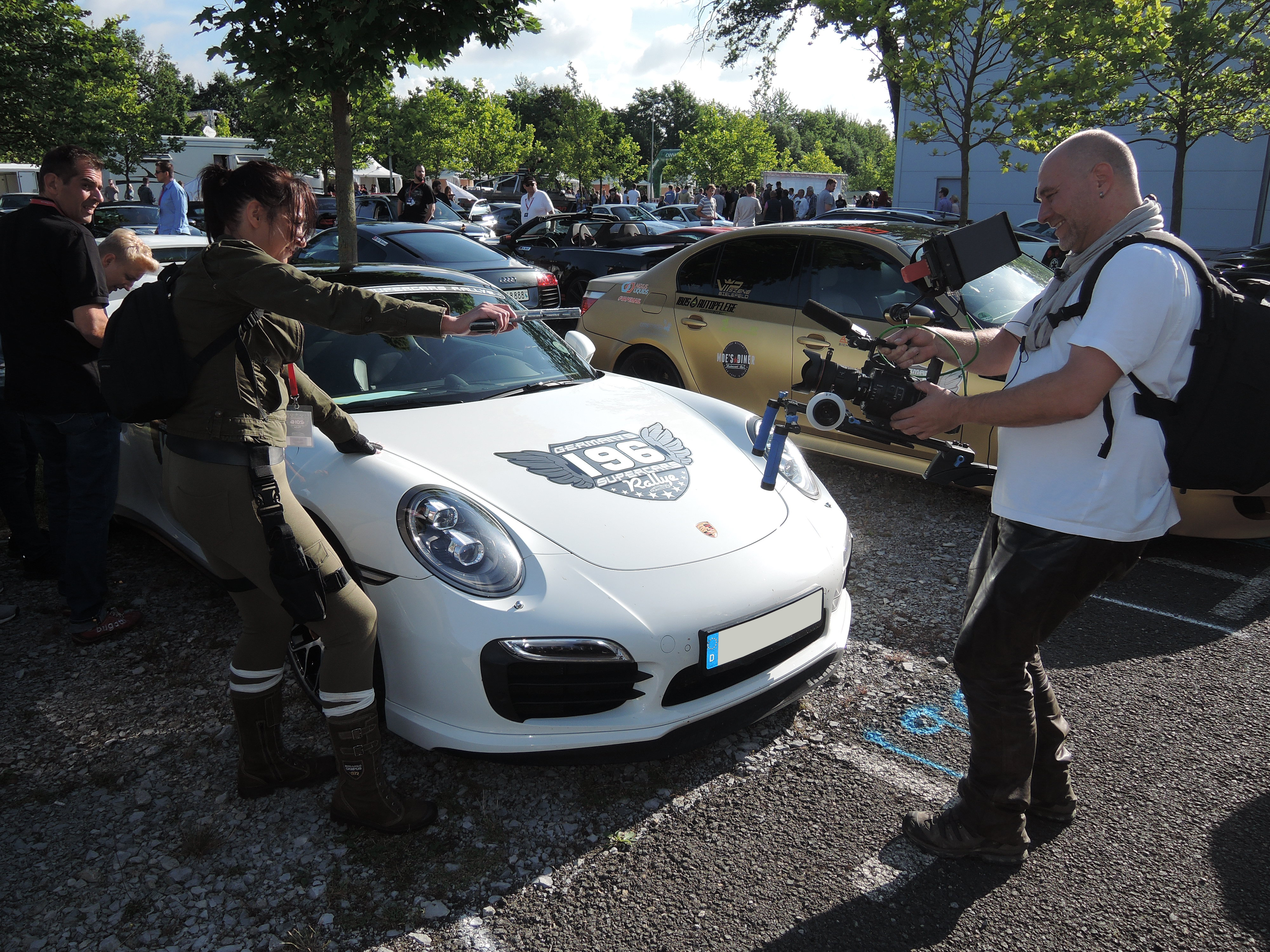 Ein Filmteam bei Dreharbeiten zur GSR 2016